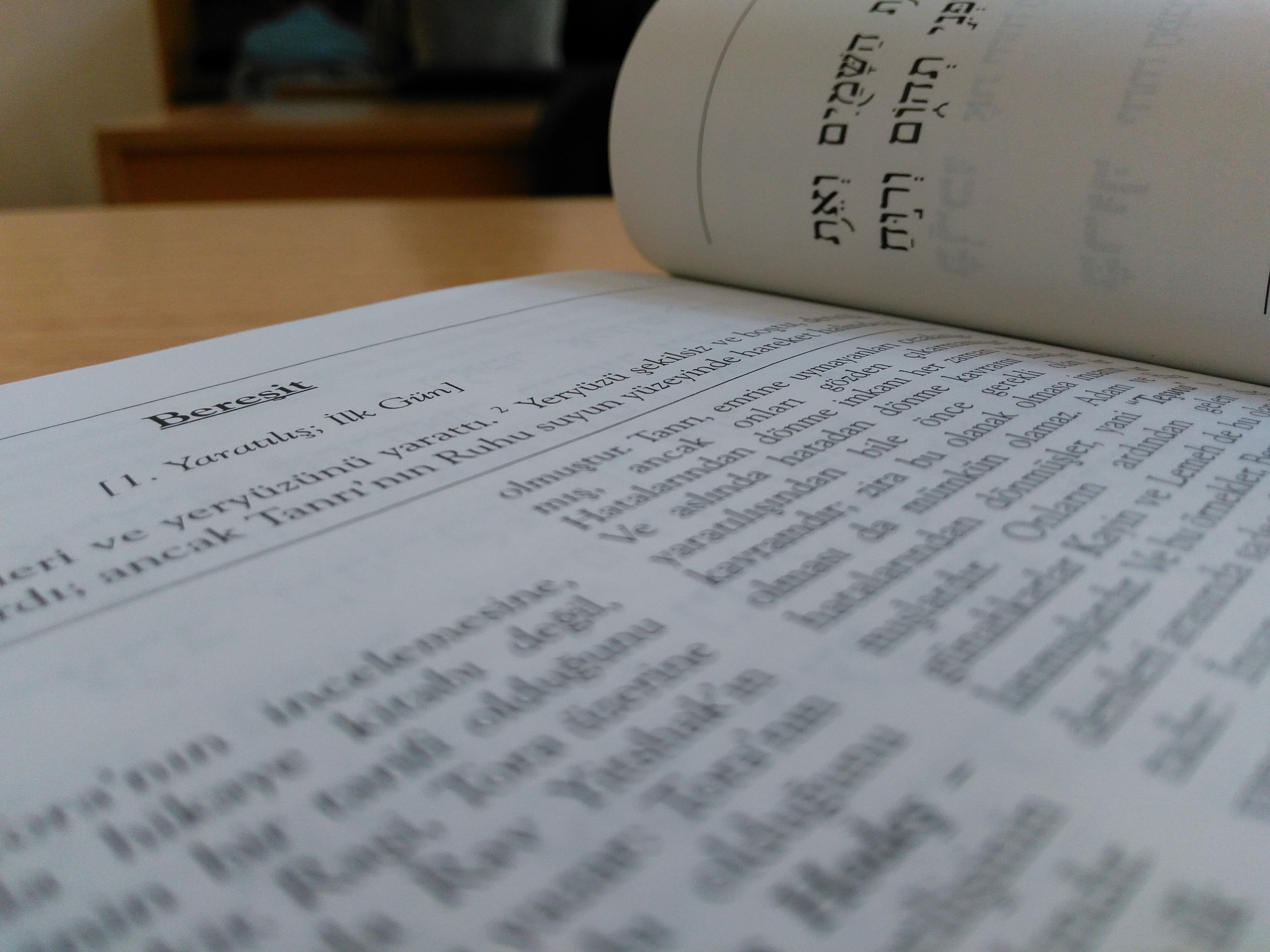 Yaratılış Kitabın giriş bölümü